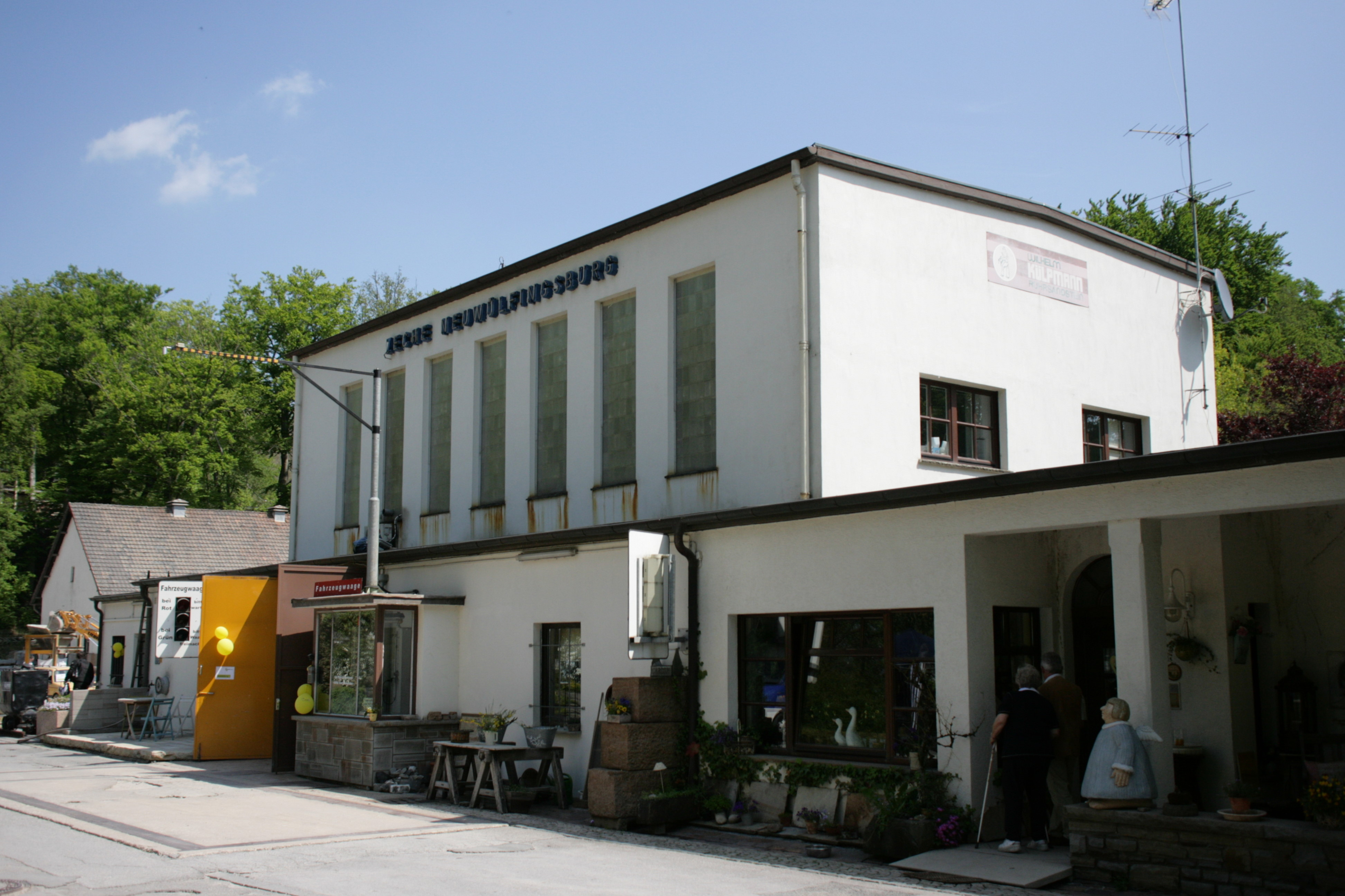 Ehemalige Zeche Neuwülfingsburg, jetzt Fa. Naturstein Külpmann in Wetter (Ruhr): alte Waschkaue, Wasch- Dusch- und Toilettenräume